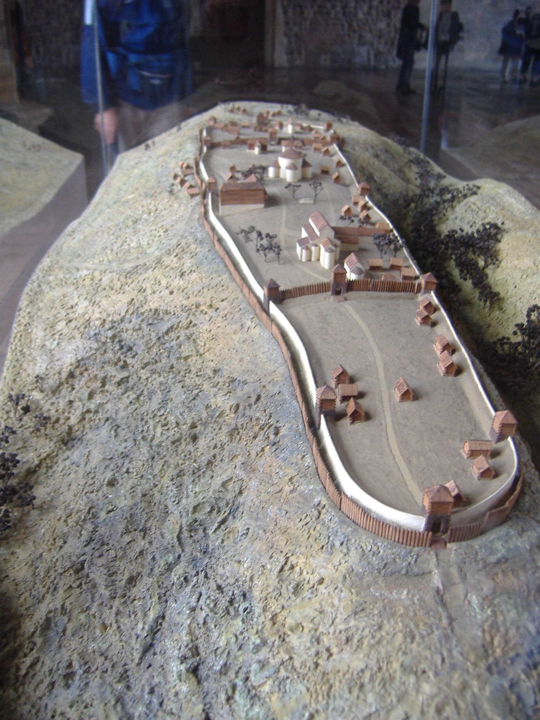 És una maqueta del primer recinte amurallat del castell de Praga, amb l'esglesia de San Vito al centre.